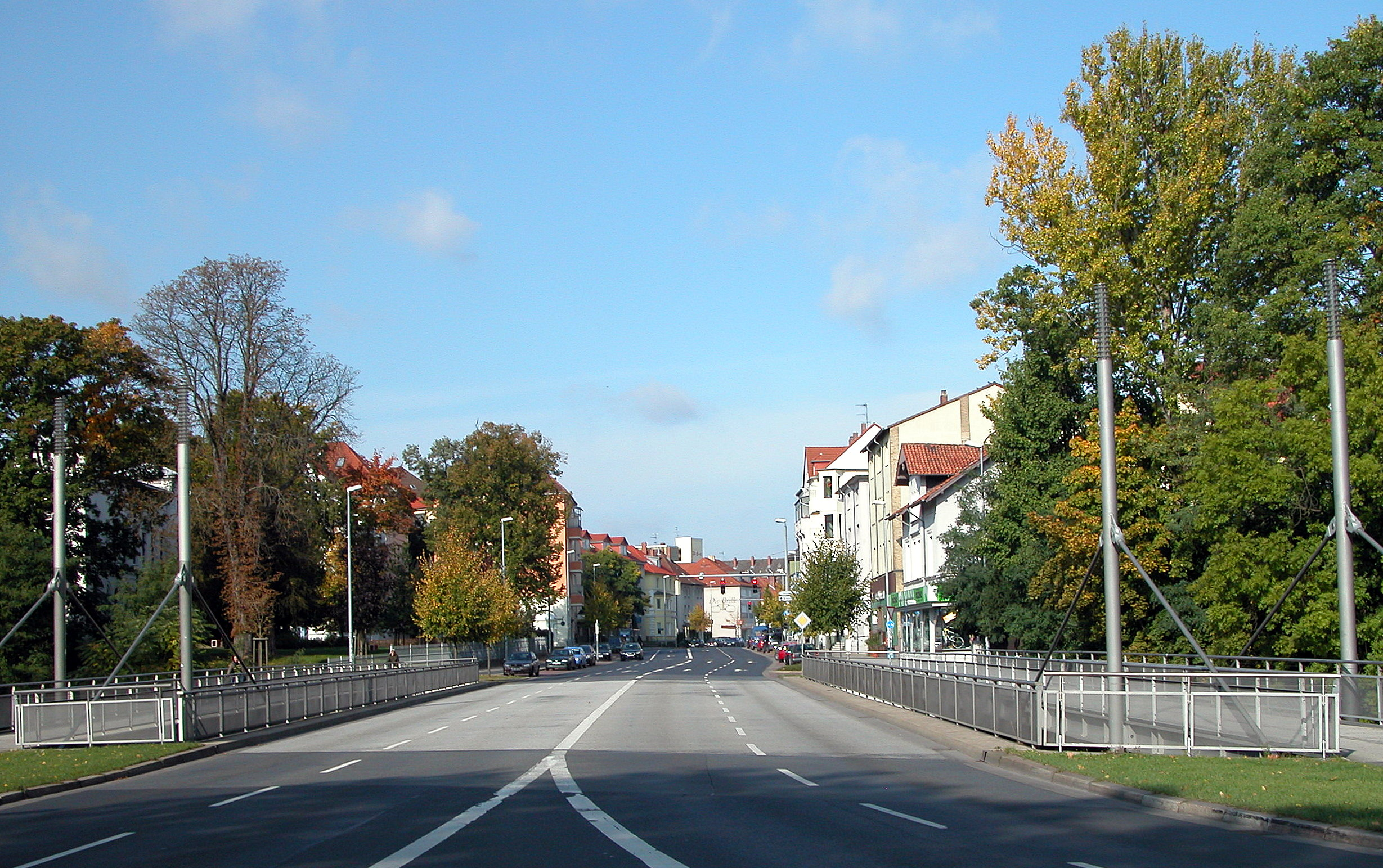 Braunschweig: Petritor-Brücke vom Radeklint aus gesehen.